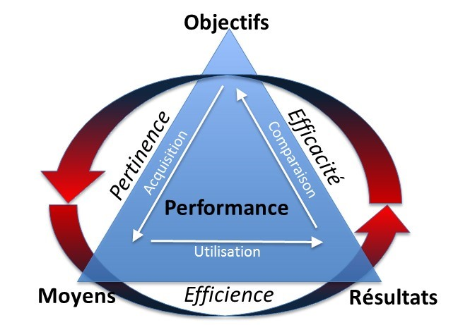 Représente le modèle de performance de Gibert avec les notions de transformation et d'amélioration continue